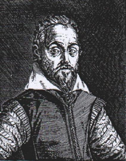 chimiste, médecin et écrivain français